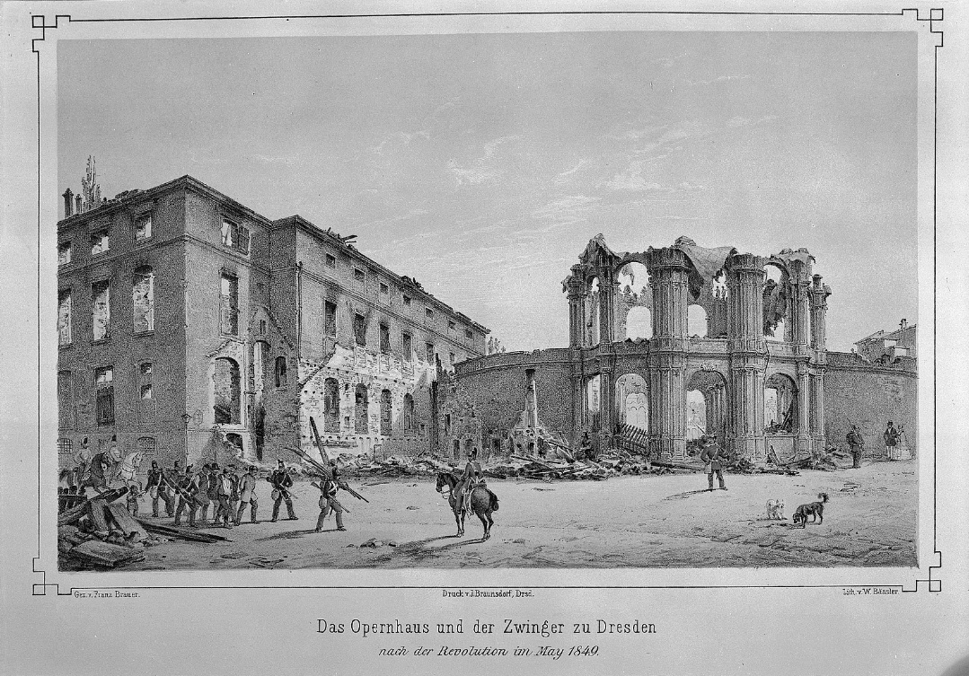 Das Opernhaus und der Zwinger zu Dresden nach dem Maiaufstand 1849. Kupferstich von W. Bässler, Staatliche Kunstsammlungen Dresden, Kupferstich-Kabinett, Sax. top. IV 3, 32.